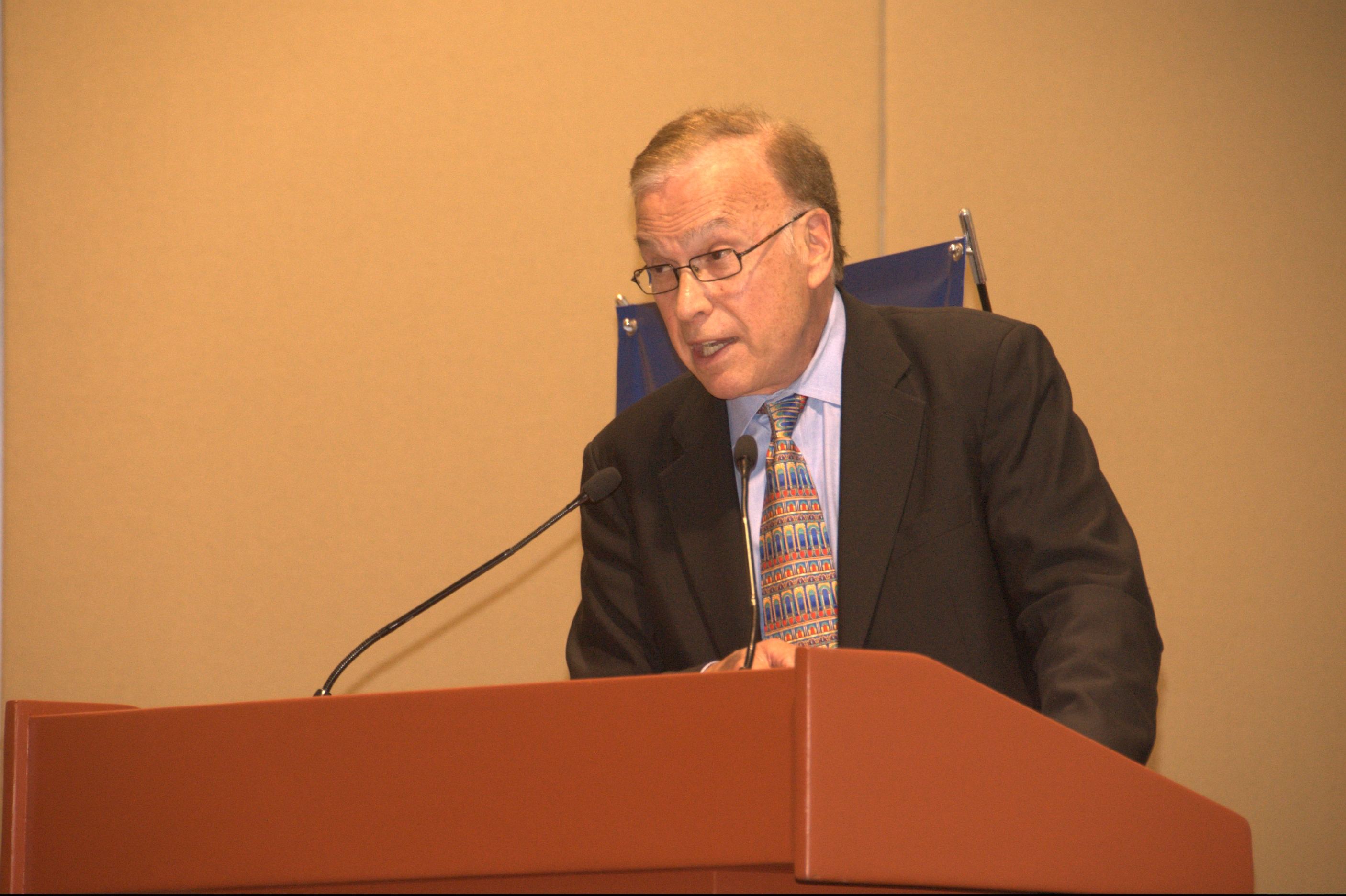 Lester M. Salamon en the XII Congreso del Tercer Sector en el ITESM-Campus Ciudad de Mexico